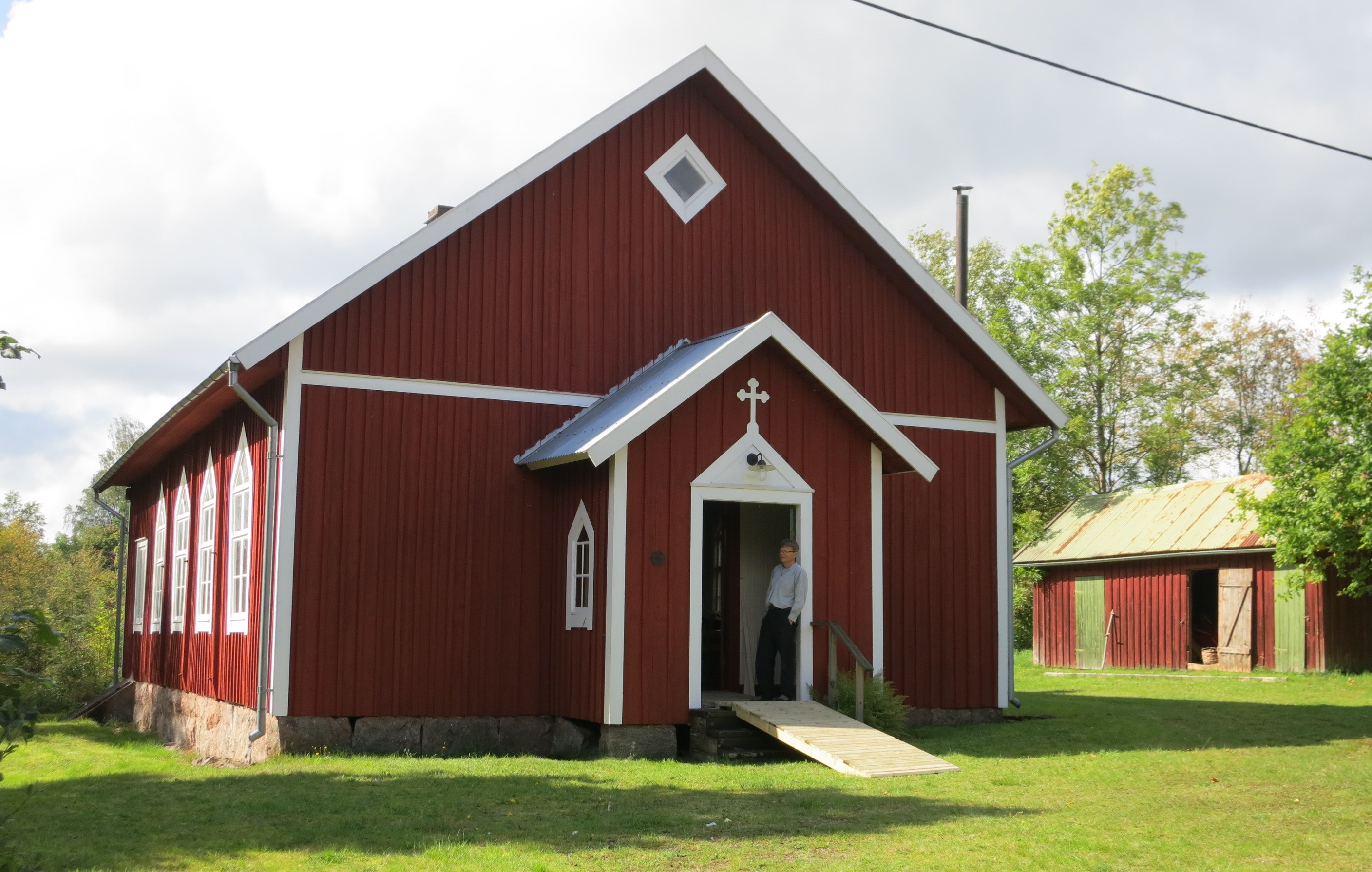 Missionshuset i Rydöbruk, Hylte kommun, Halland